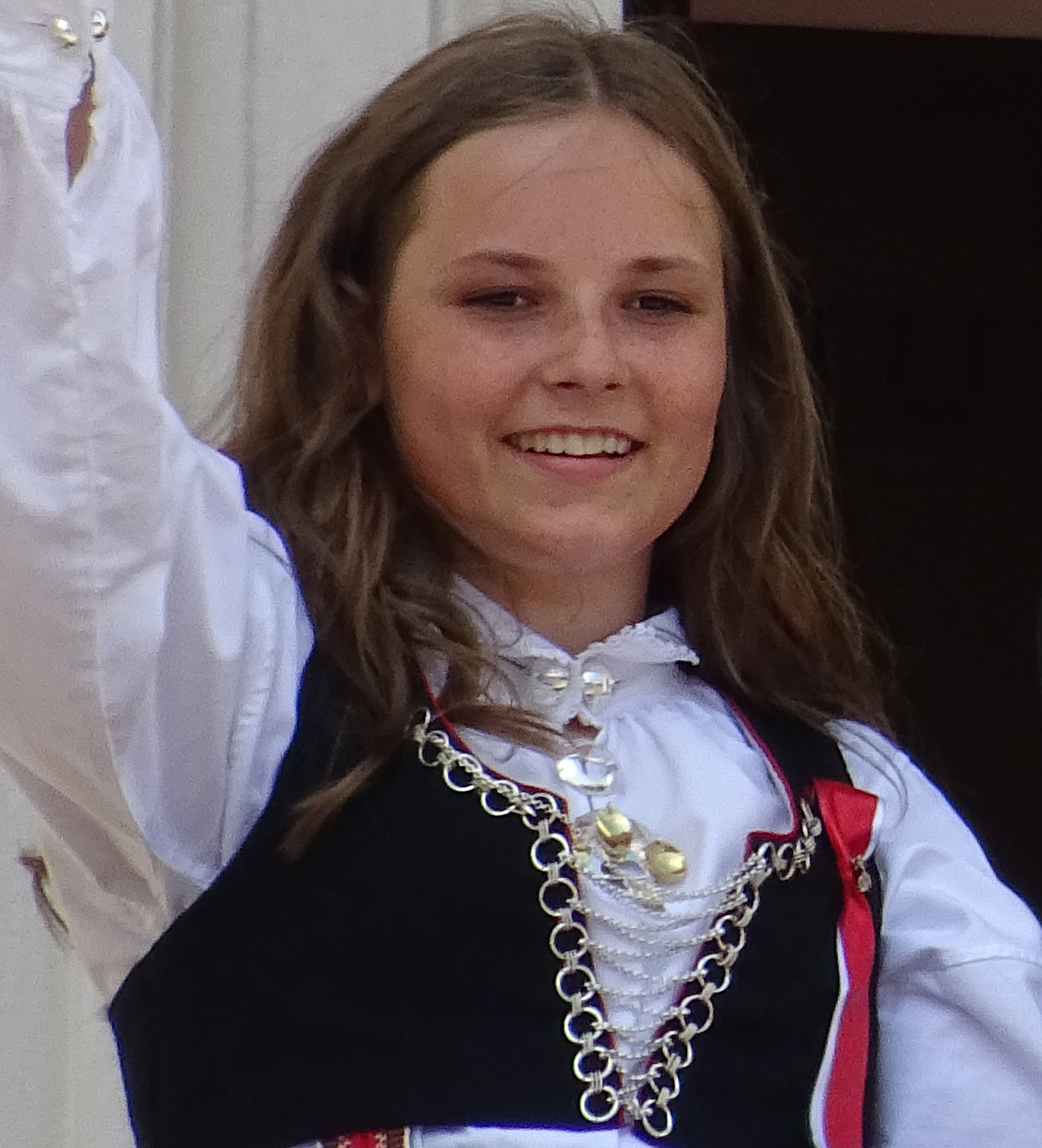 Ingrid Alexandra de Norvège, le 17 mai 2018 à Oslo